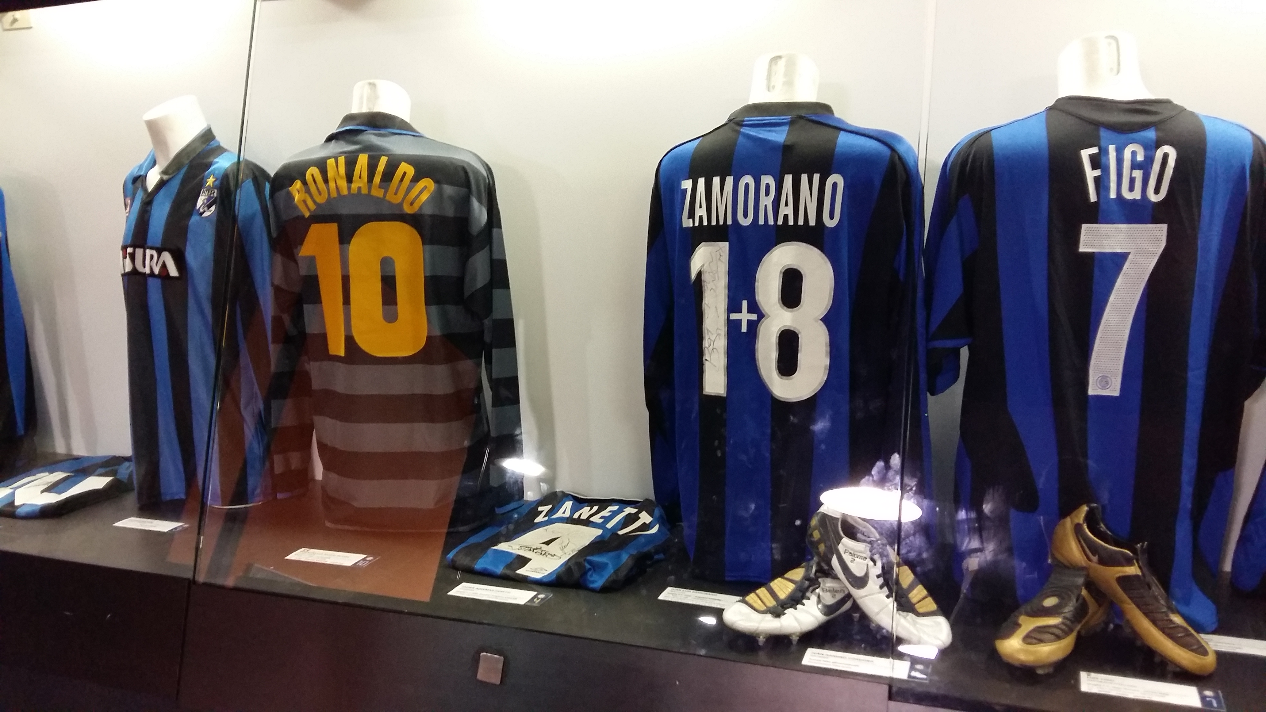 Футболки Рональдо, Хавьера Санетти, Ивана Саморано и Луиша Фигу в музее Сан-Сиро.